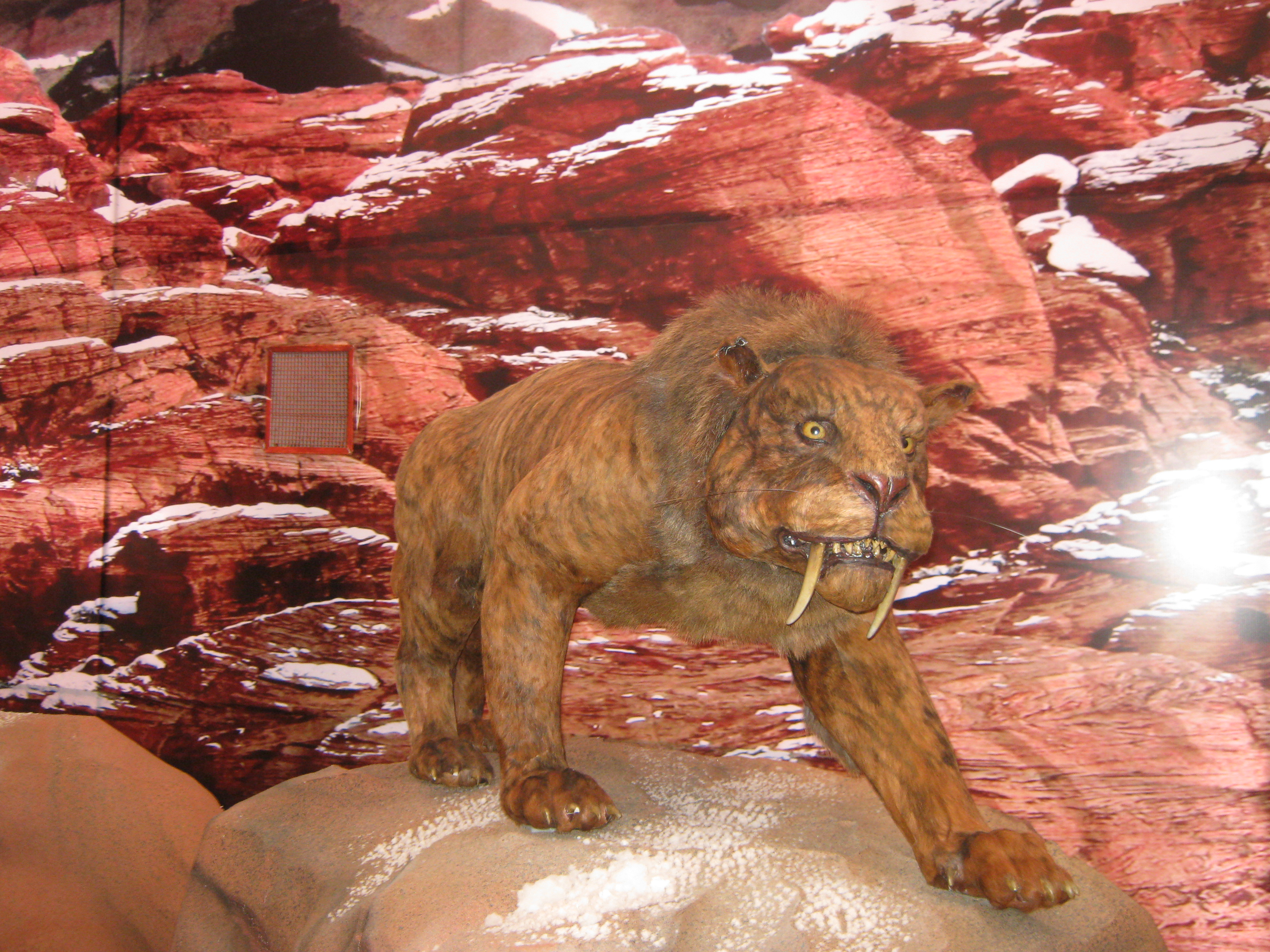 Smilodon fatalis en Jardín Plaza, Cali, Colombia. Esta fotografía fue tomada en el municipio colombiano con código 76001.